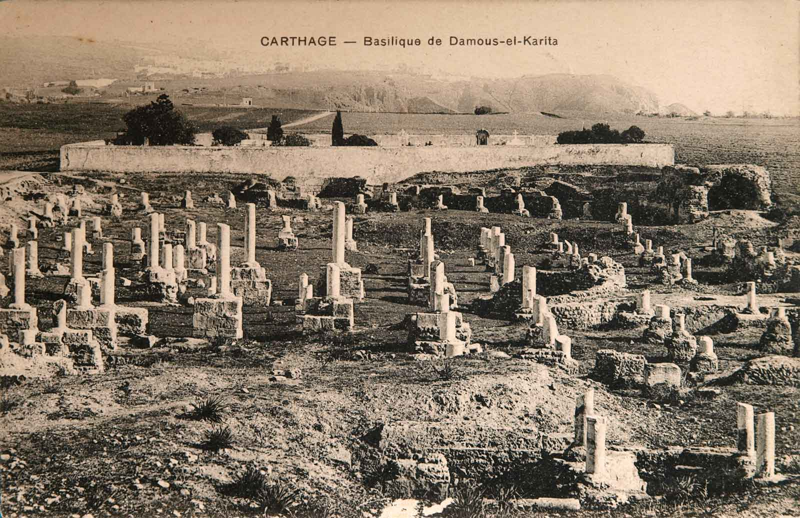 ruines de la basilique Damous el Karita